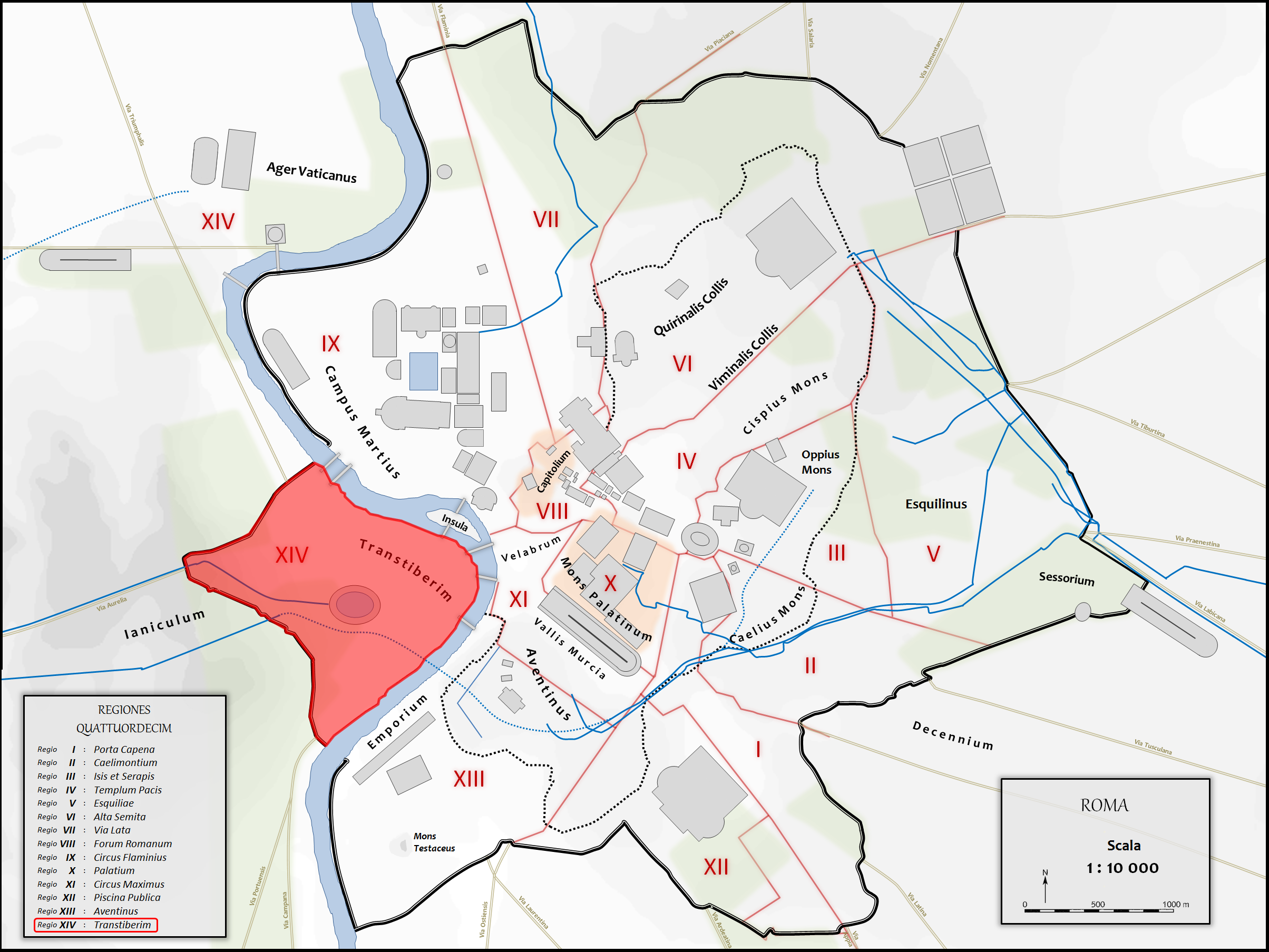 Plan intemporel de la Rome antique : Regio XIV Transtiberim